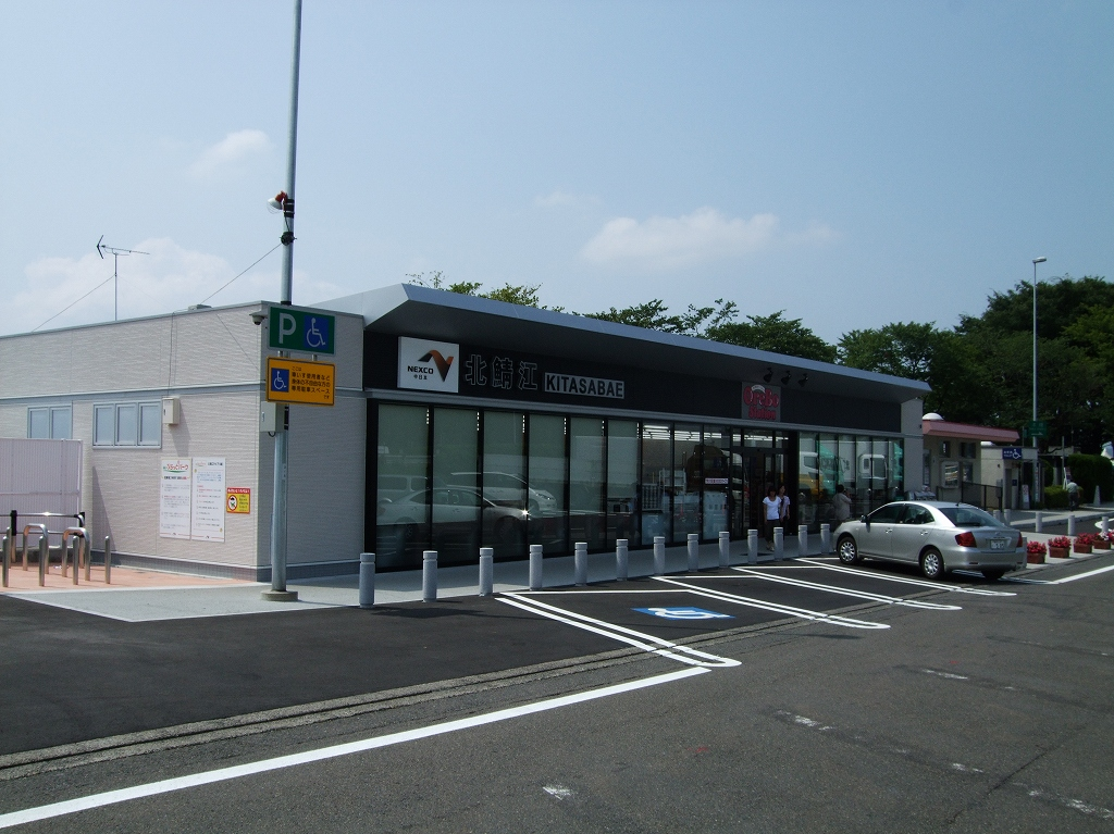 北陸自動車道 北鯖江パーキングエリア（下り線・新潟方面）